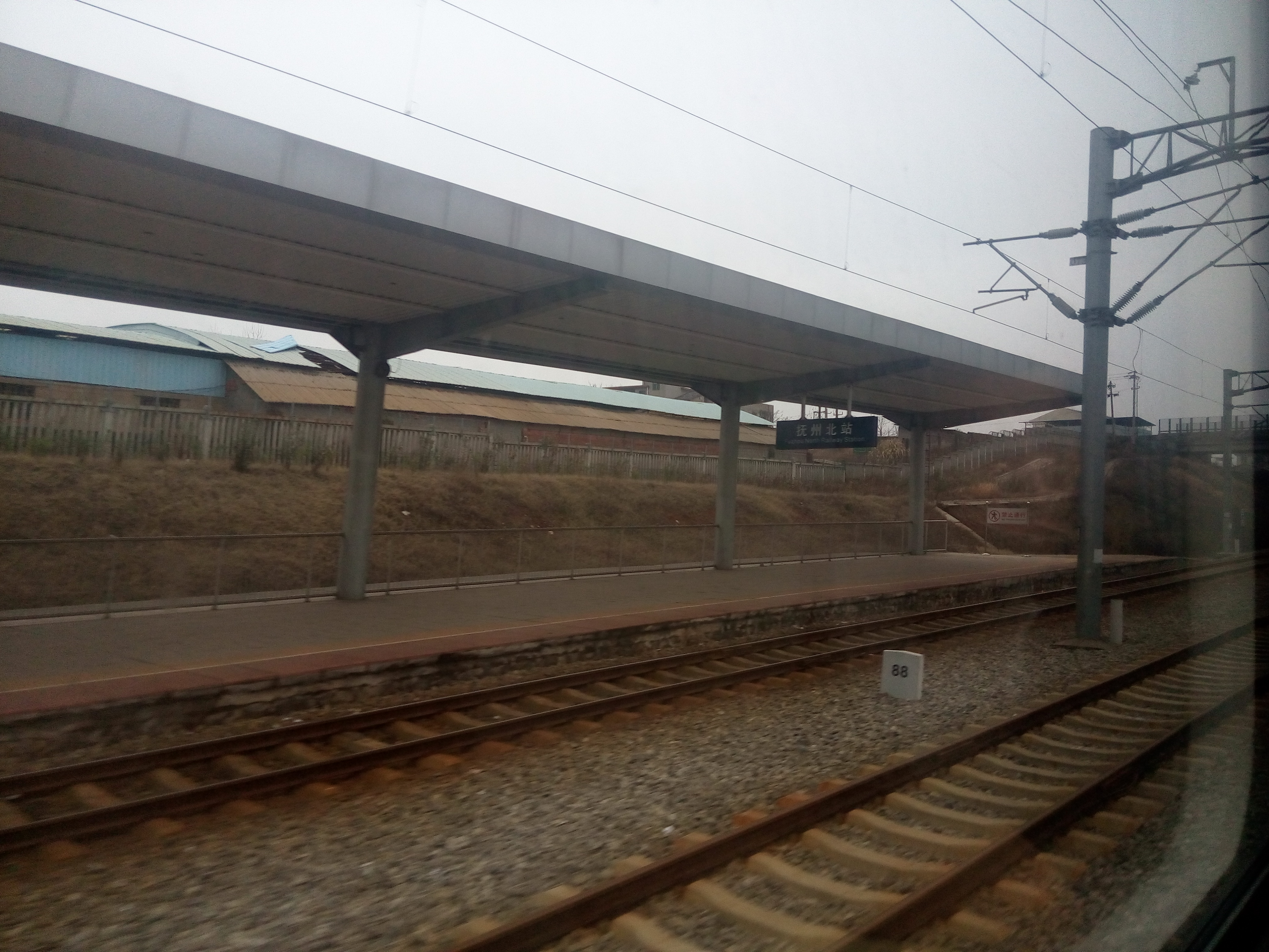 抚州北站台